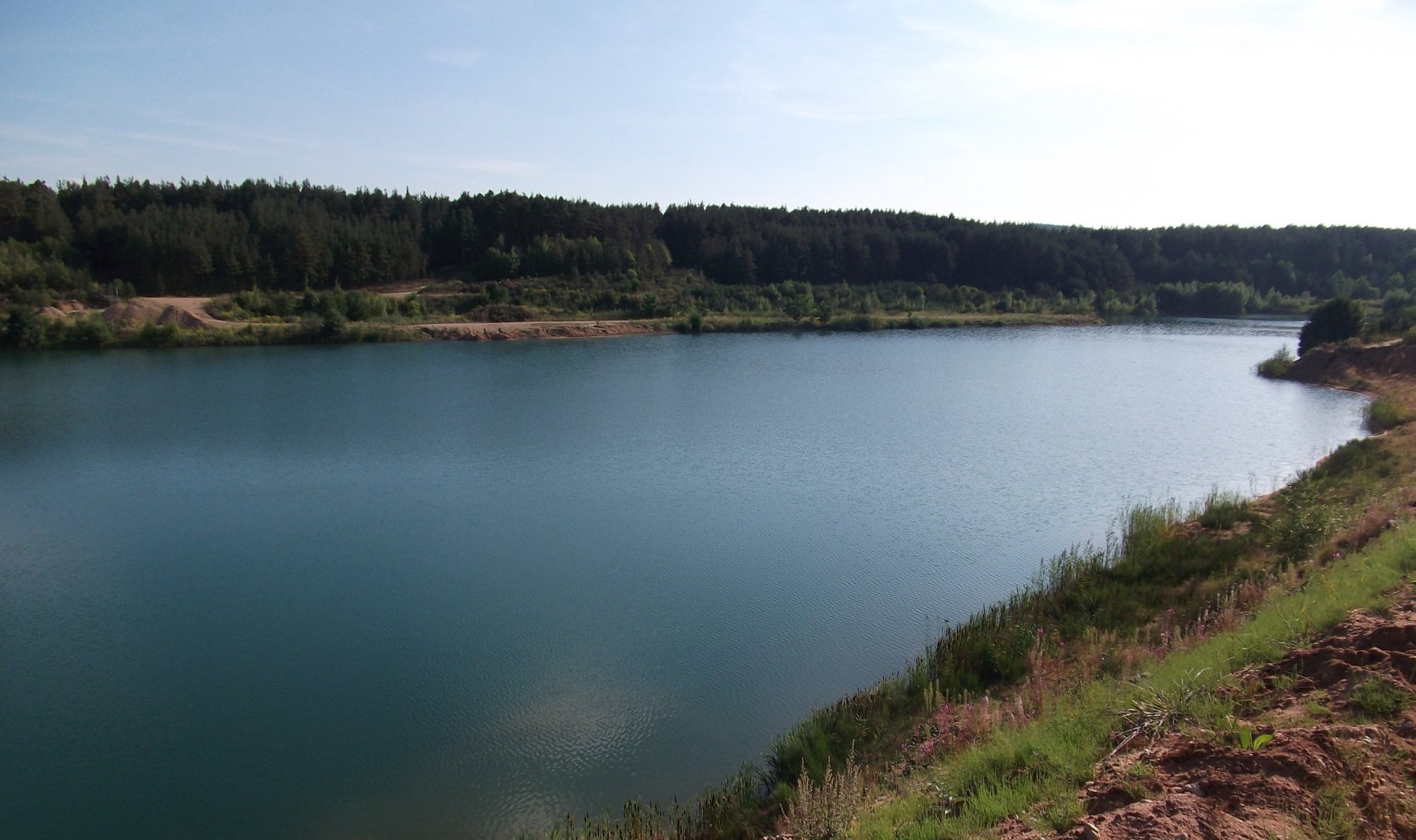 Baggersee - unter Naturschutz